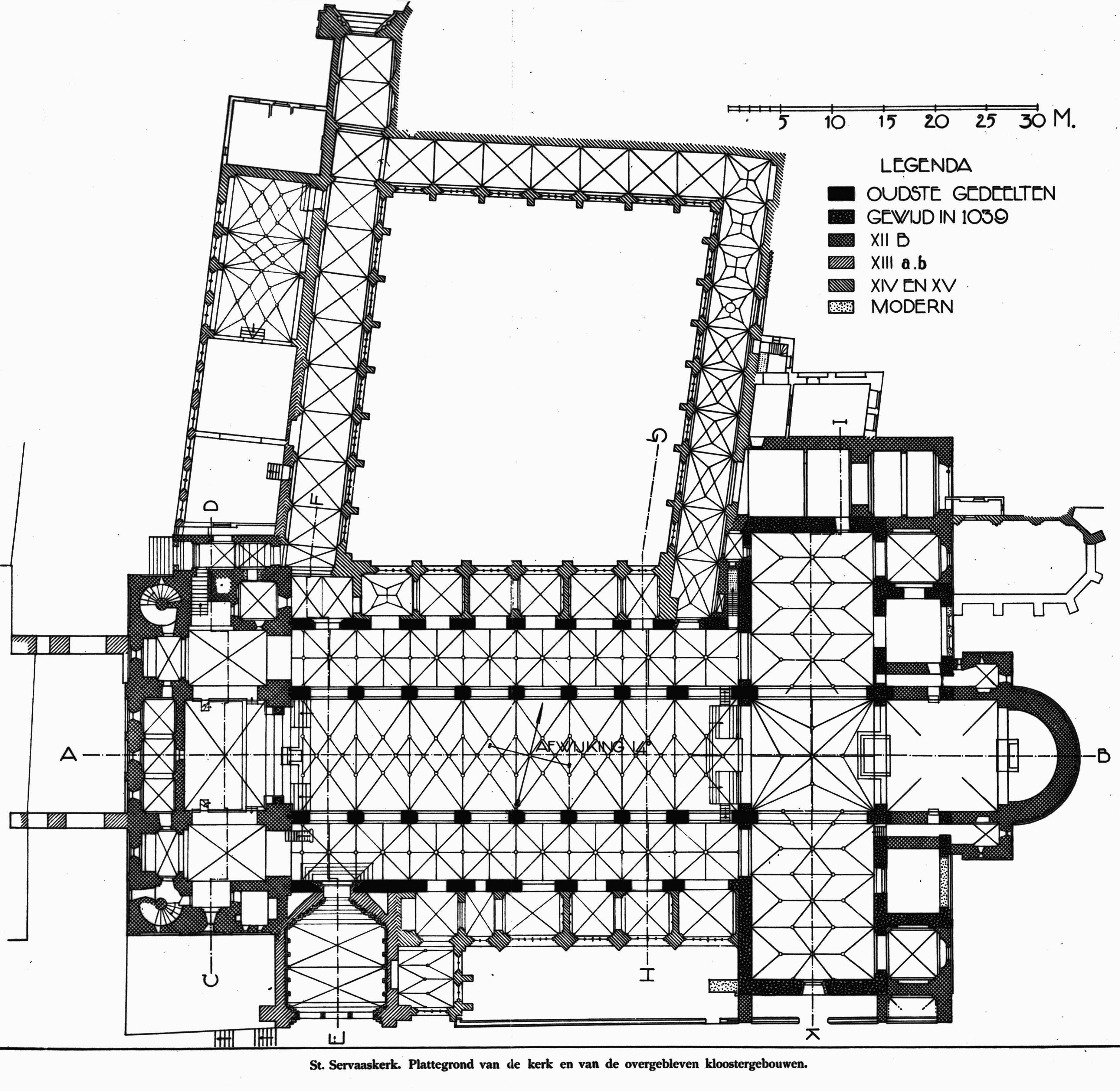 Sint-Servaaskerk en kruisgang: plattegrond plaat X reproductie uit De Monumenten van geschiedenis en kunst in de provincie Limburg.